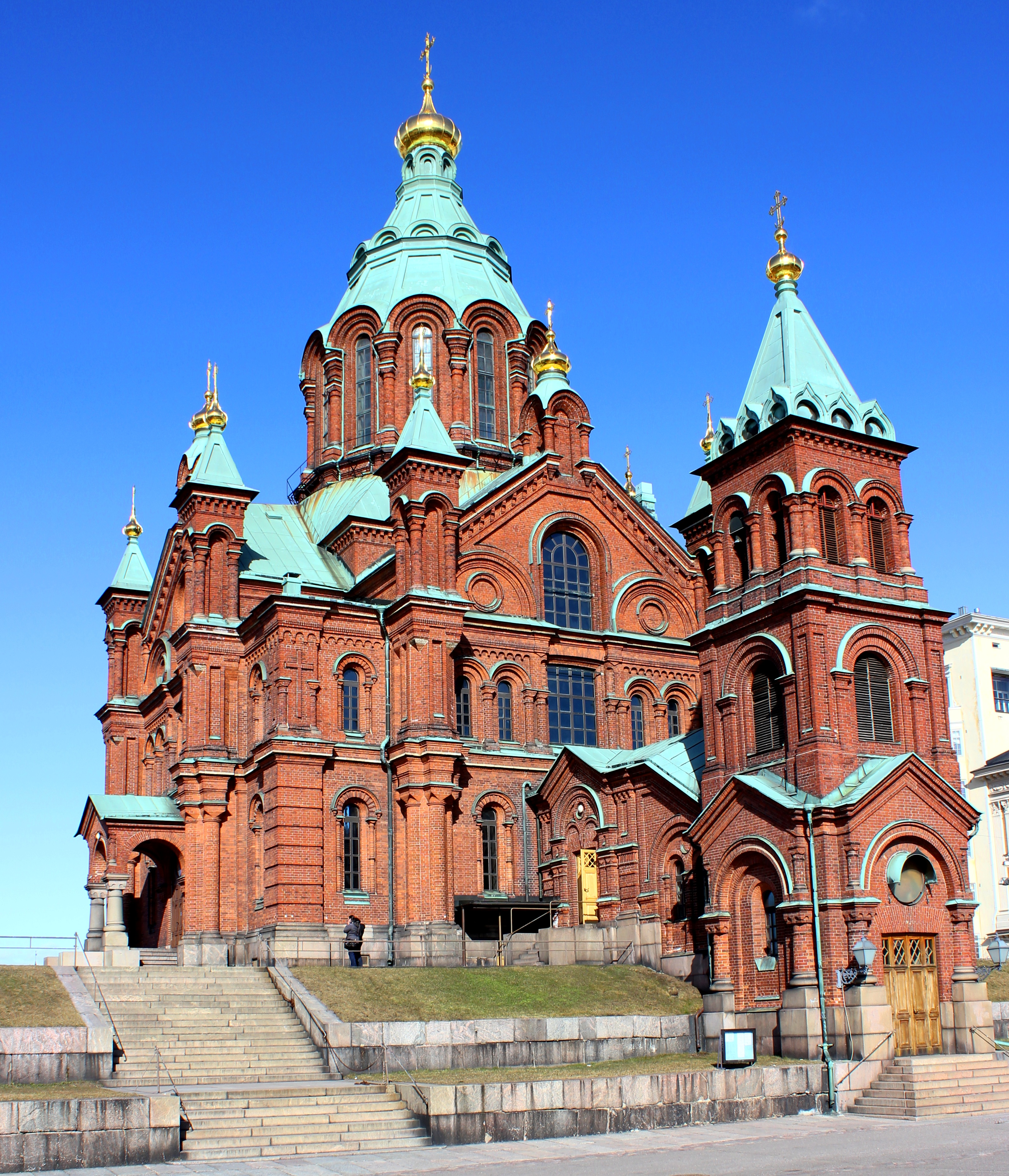 Uspenski Cathedral